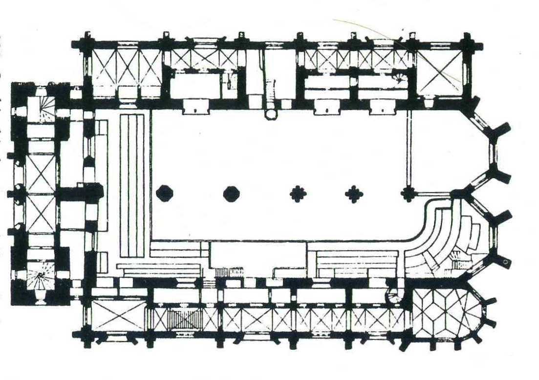 Dresden Sophienkirche mit Busmannkapelle Grundriss